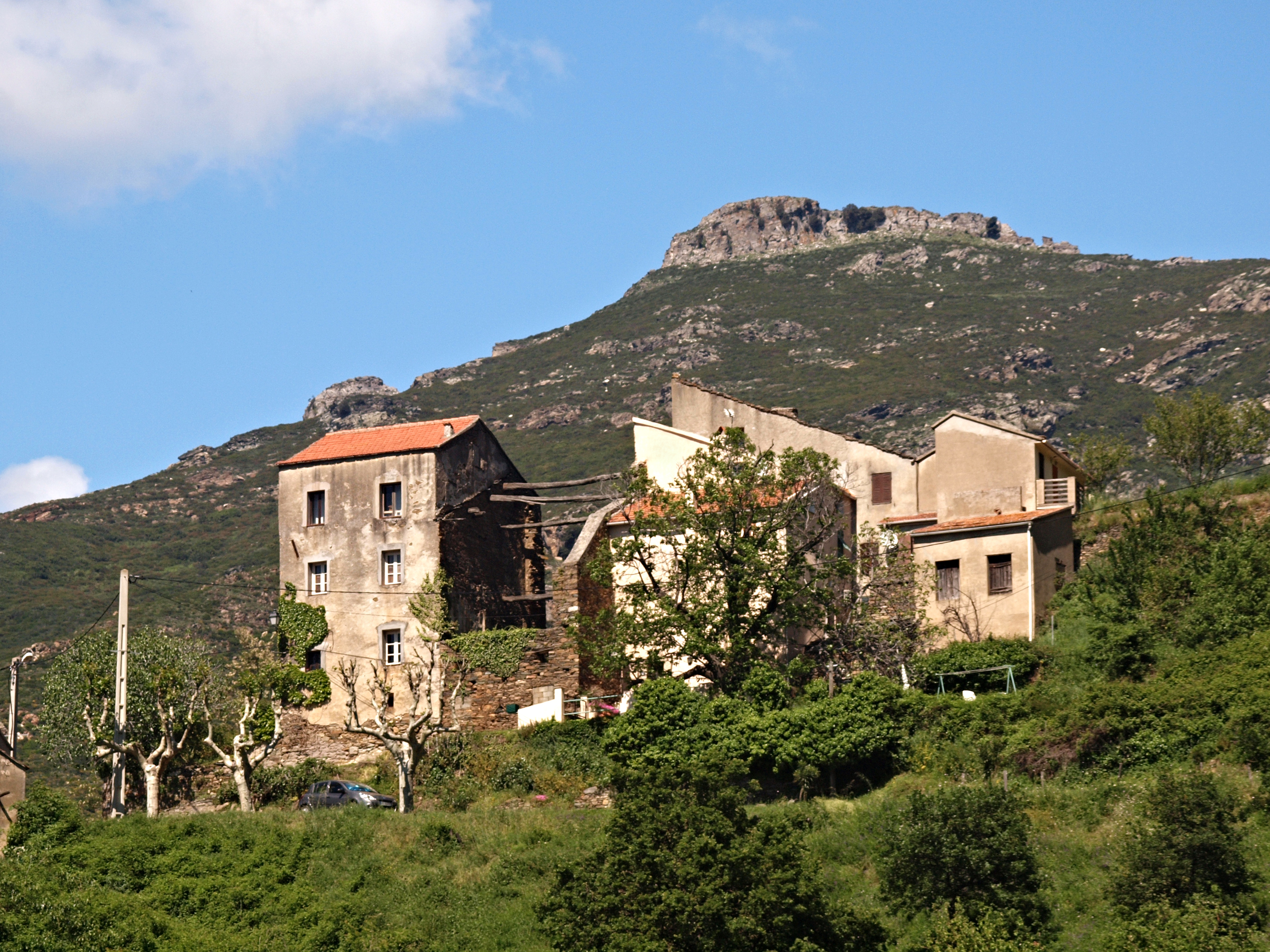 Poggio-d'Oletta, Nebbio (Corse) - Le haut de Poggio, dominé par le Monte a a Torre (852 m)